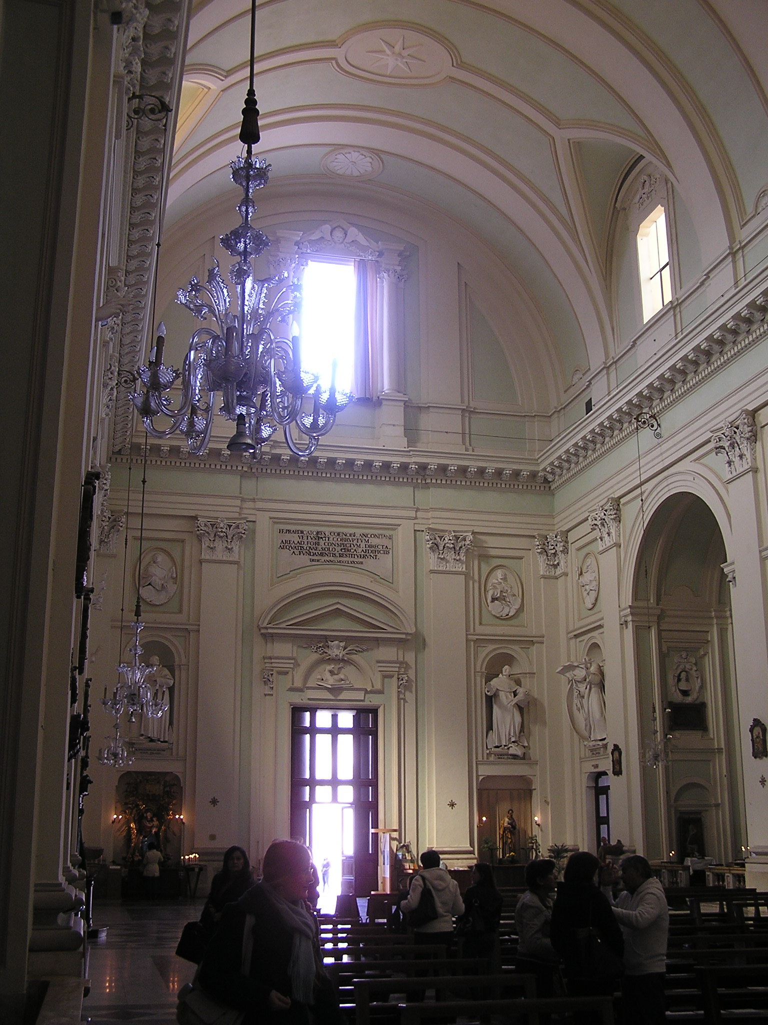 Ancona - Chiesa di San Domenico - controfacciata